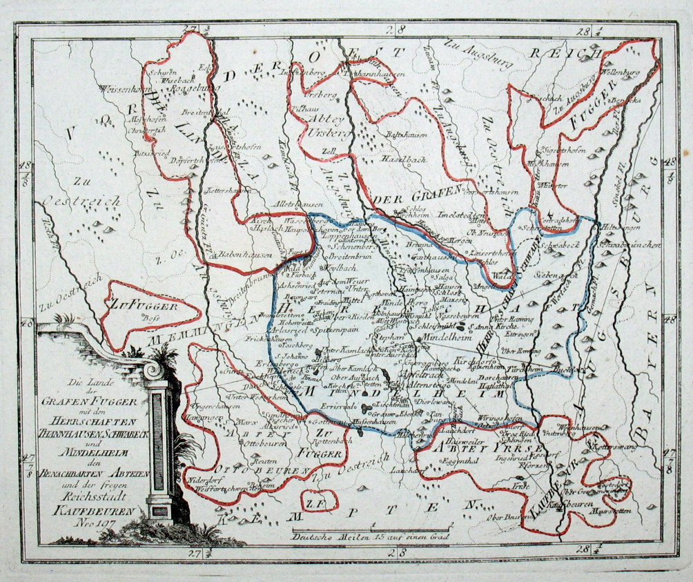 Die Lande der Grafen Fugger mit den Herrschaften Thannhausen, Schwabeck und Mindelheim den Benachbarten Abteyen und der freyen Reichsstadt Kaufbeuren. Nro. 197. Kolorierter Kupferstich